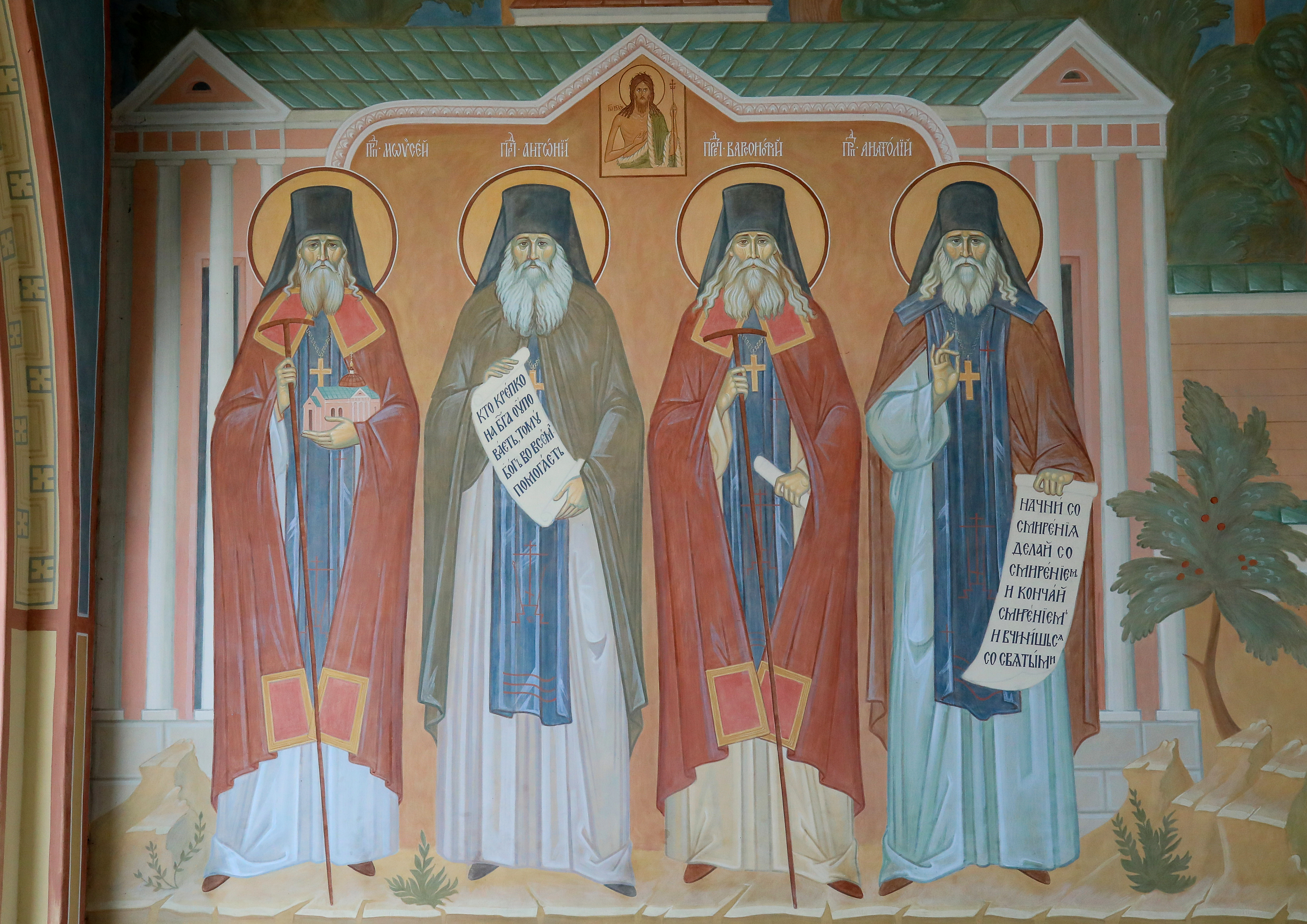 Фрагмент росписи Южных врат в Оптину пустынь.